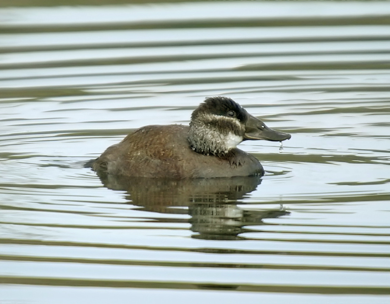 Malvasía cabeciblanca - Ànec cap-blanc - White-headed Duck - Oxyura leucocephala, female, Clot-de-Galvany, Alicante, España